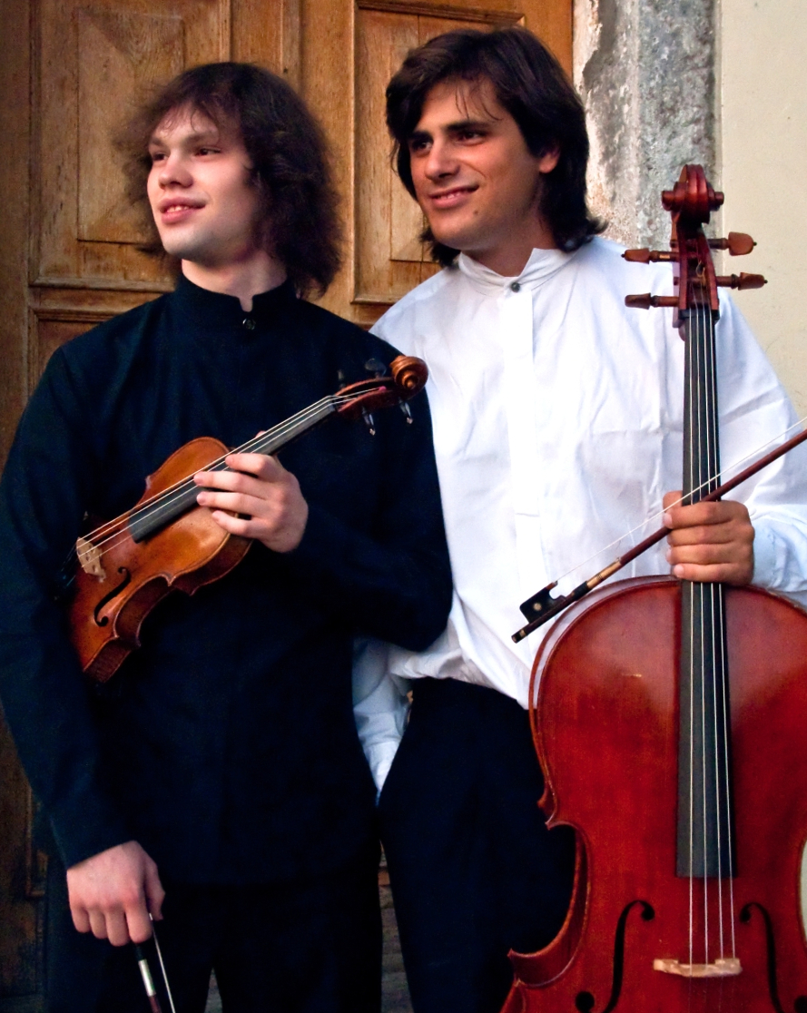 Marco Graziani i Stjepan Hauser